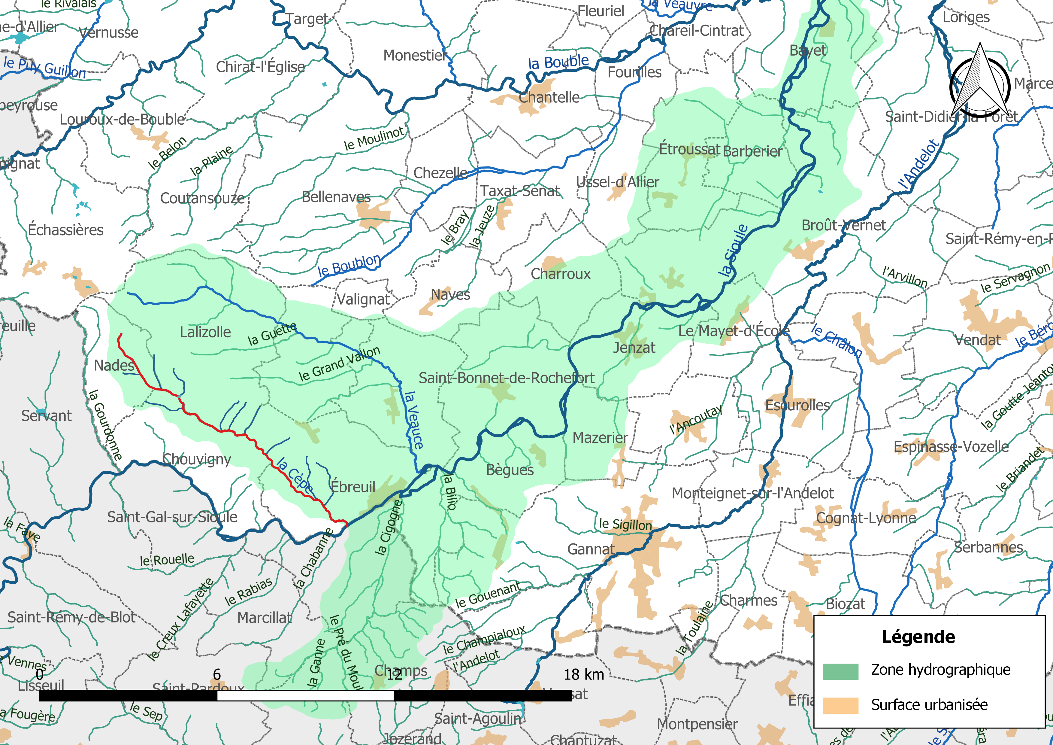 Carte du cours d'eau « la Cèpe » (France) et de la zone hydrographique dans laquelle il s'insère.